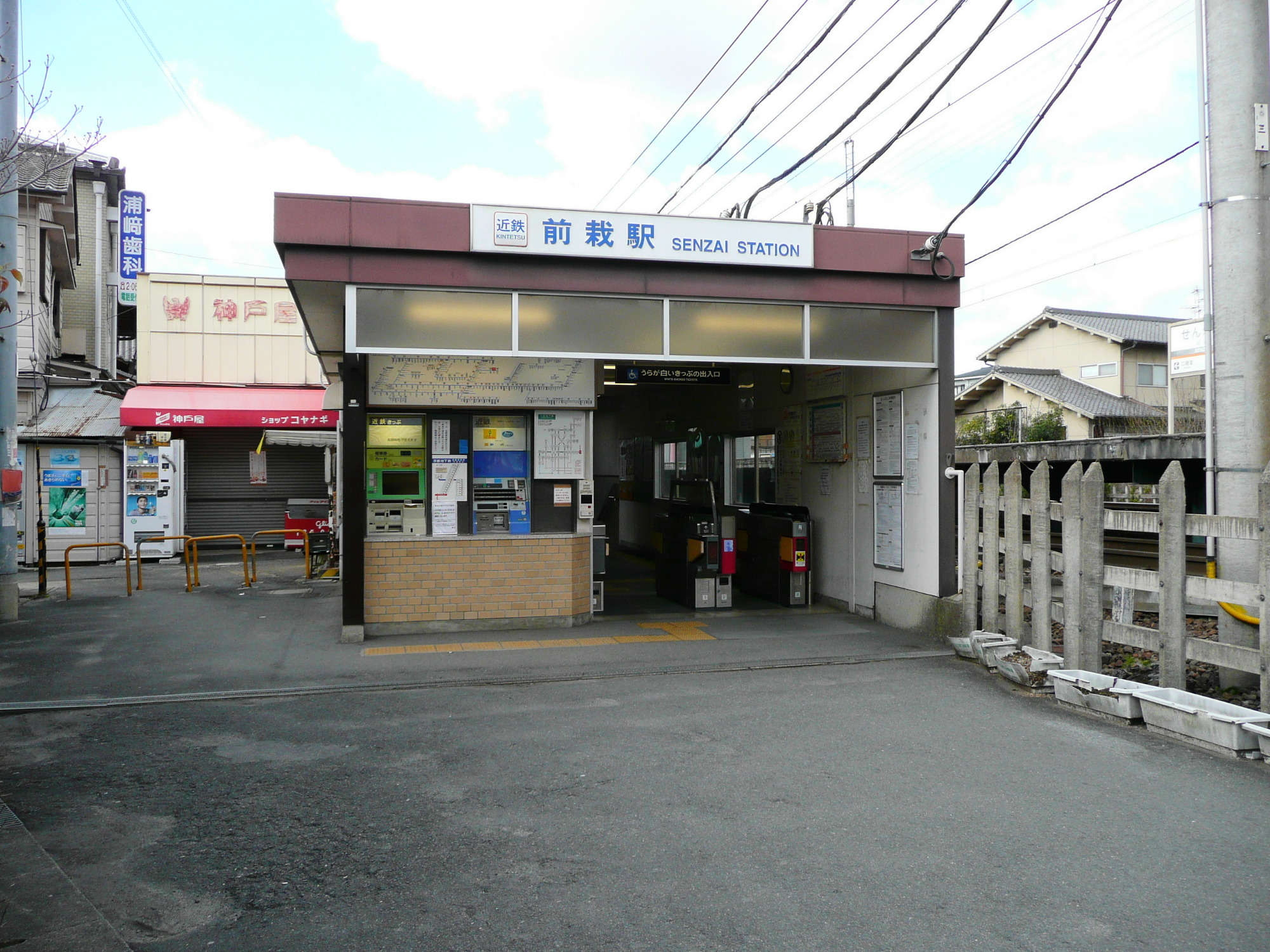 Kinki Nippon Railway,Tenri Line,Senzai Station. /近鉄天理線前栽駅